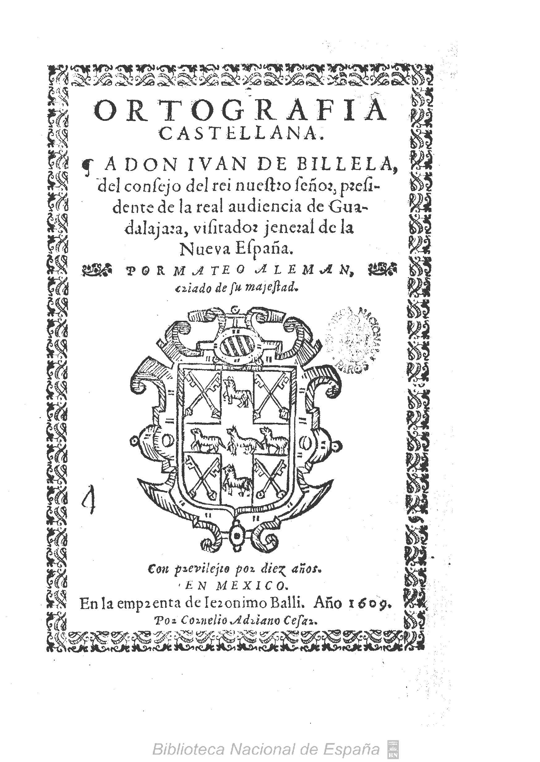 Ortografia Castellana... [Texto impreso] / por Mateo Aleman.... - En Mexico : en la imprenta de Ieronimo Balli, por Cornelio Adriano Cesar, 1609. - [7], 83 h., [1 ] h. de grab. ; 4º. Signatura R/5060